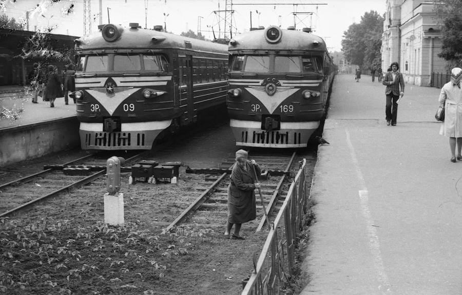 Построен в десятивагонной составности. С завода поступил в депо Москва-Октябрьская Октябрьской ж.д. В 1969 г. передан в ТЧ Ленинград-Витебский. Вагон 905 передан Кировской ГРЭС, где использовался для перевозки пассажиров по маршруту ст. Невдубстрой — Кировск под тягой ТГМ4. С одной стороны был оборудован постом для составителя. (По данным сайта "Российские электропоезда")